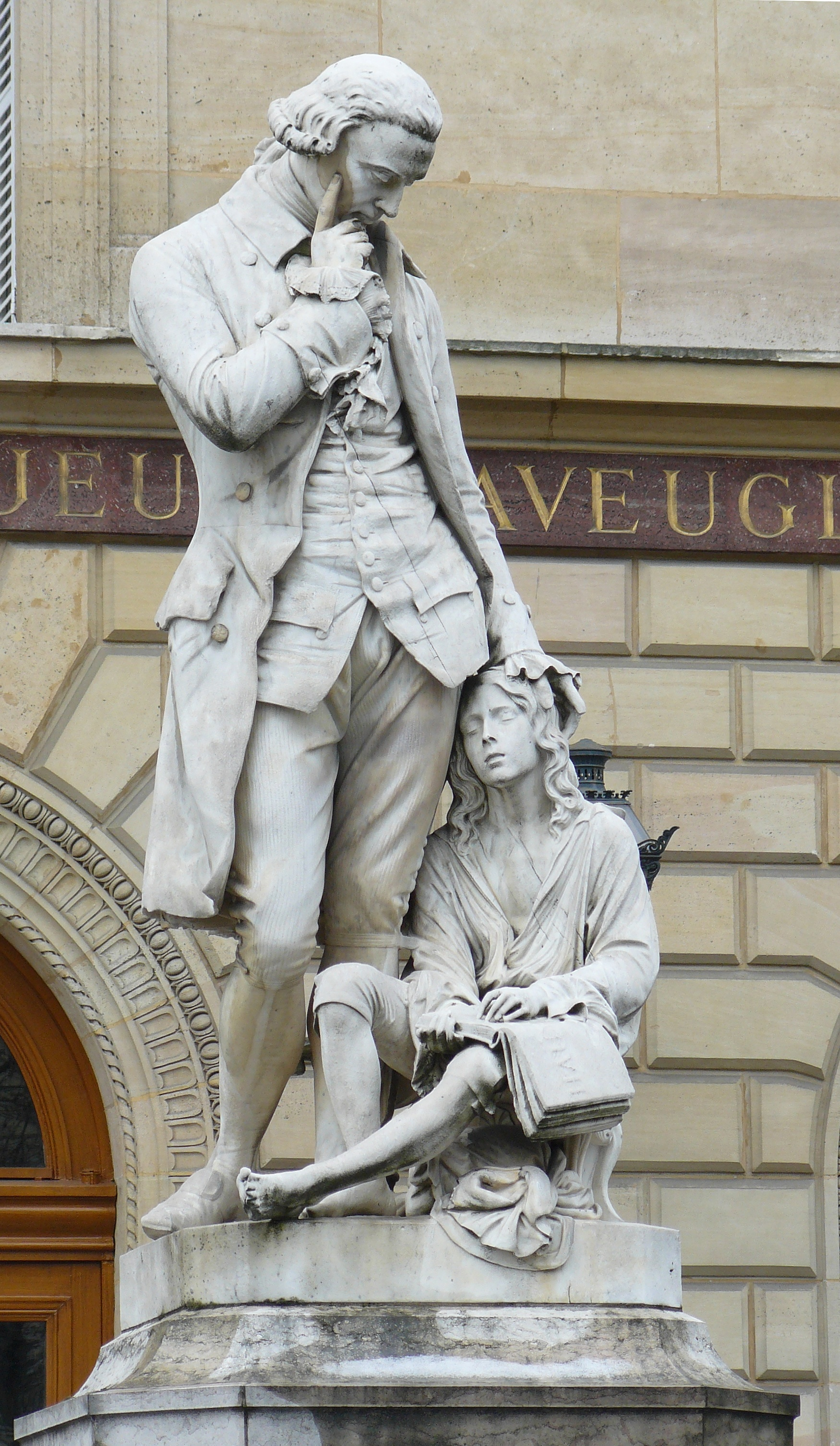 Statue de Valentin Haüy dans la cour de l'Institut national des jeunes aveugles - Boulevard des Invalides - Paris (7e) - sculpteur Jacques Joseph Emile Badiou de la Tronchère (1826-1888) - statue de 1859